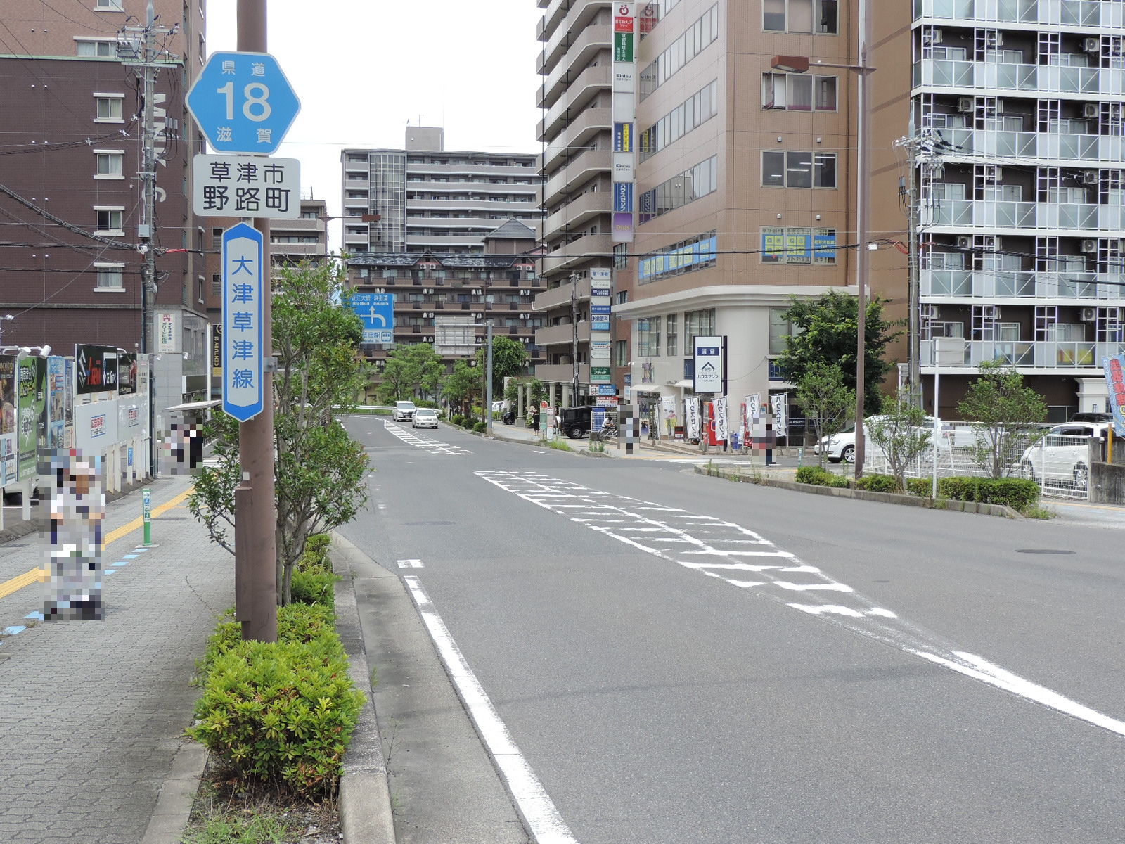 滋賀県道18号大津草津線、草津市野路（2020年6月撮影）